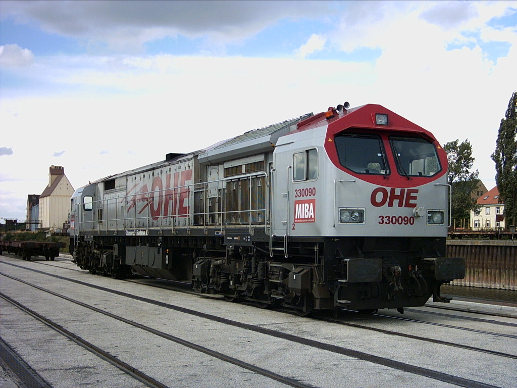 ADtranz / General Electrics DE-AC33C (Baureihe 250) "Blue Tiger".